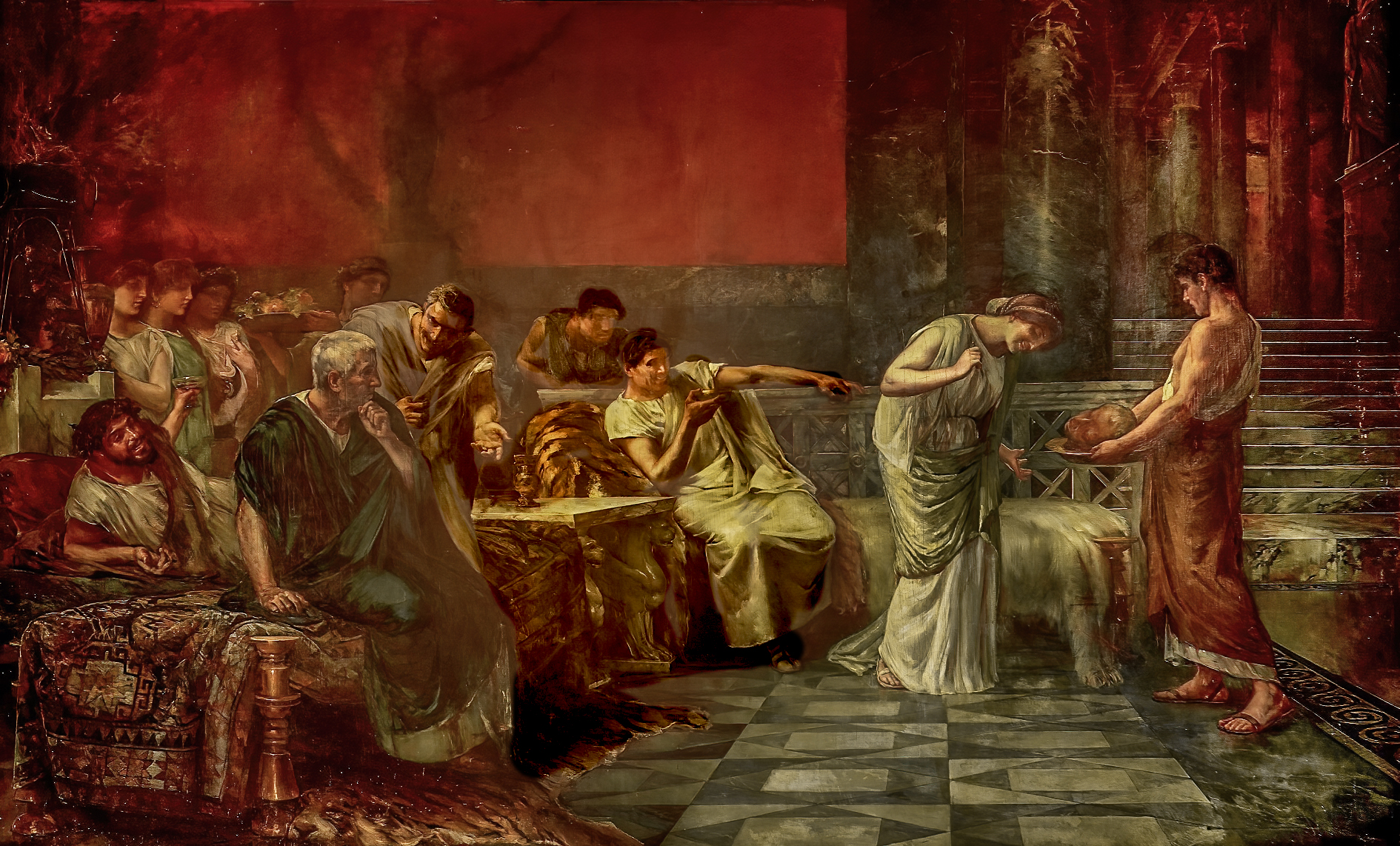 La obra representa el momento en que Fulvia, la esposa de Marco Antonio y en presencia de este último, ultrajó la cabeza cercenada del insigne político y orador Marco Tulio Cicerón, que fue ejecutado en el año 43 antes de Cristo por orden de Marco Antonio como venganza por los muchos discursos que había pronunciado contra él.